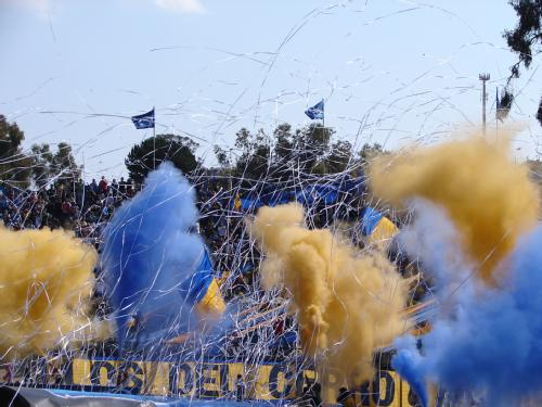 Barra Los del Cerro